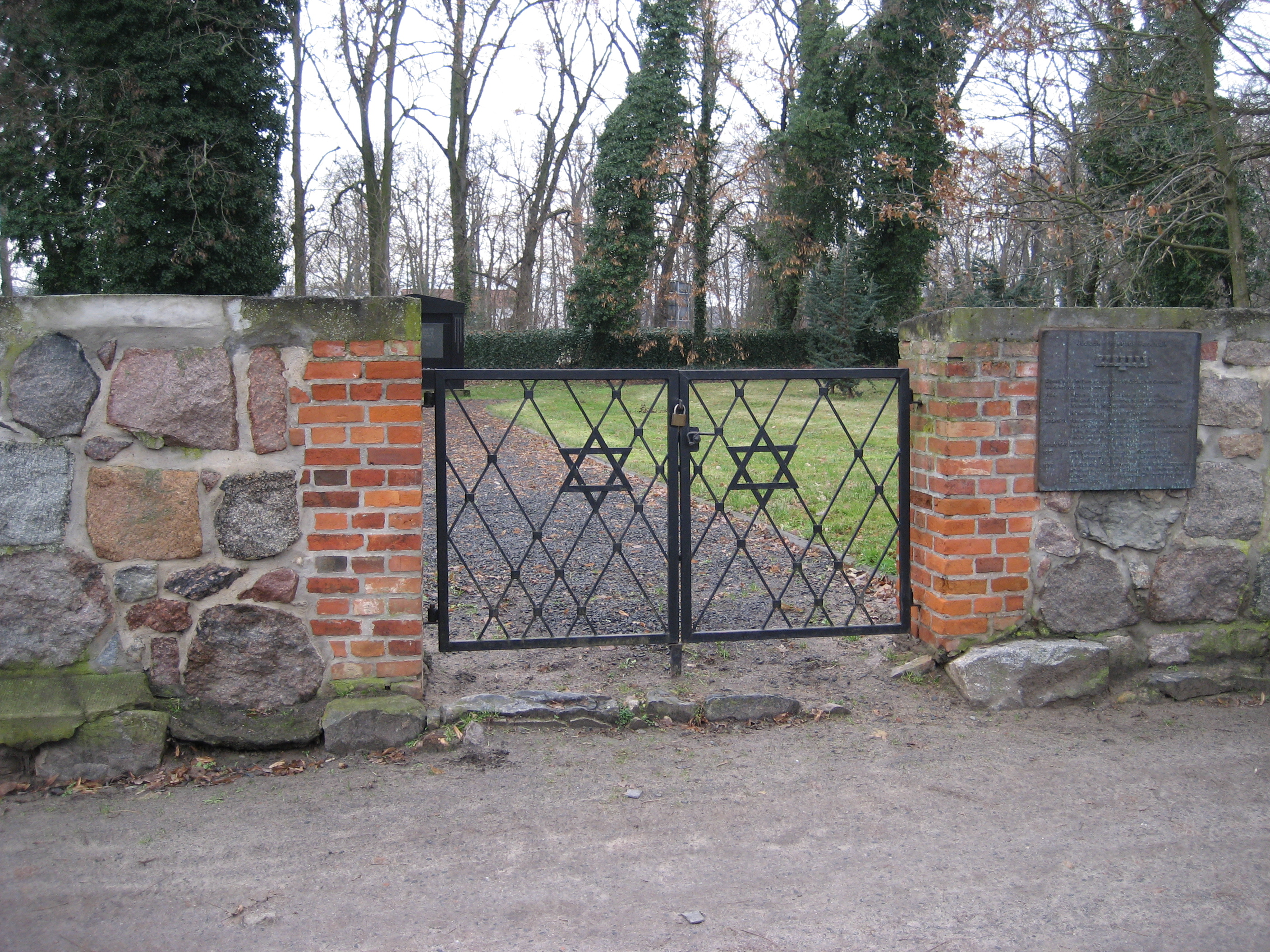 Der Eingang zum ehemaligen jüdischen Friedhof von Pasewalk südlich der Löcknitzer Straße zwischen Prenzlauer Chaussee und An der Kürassierkaserne. Zugang über den Weg an der südwestlichen Ecke der Kreuzung Löcknitzer Straße/Kalandstraße/An der Kürassierkaserne.